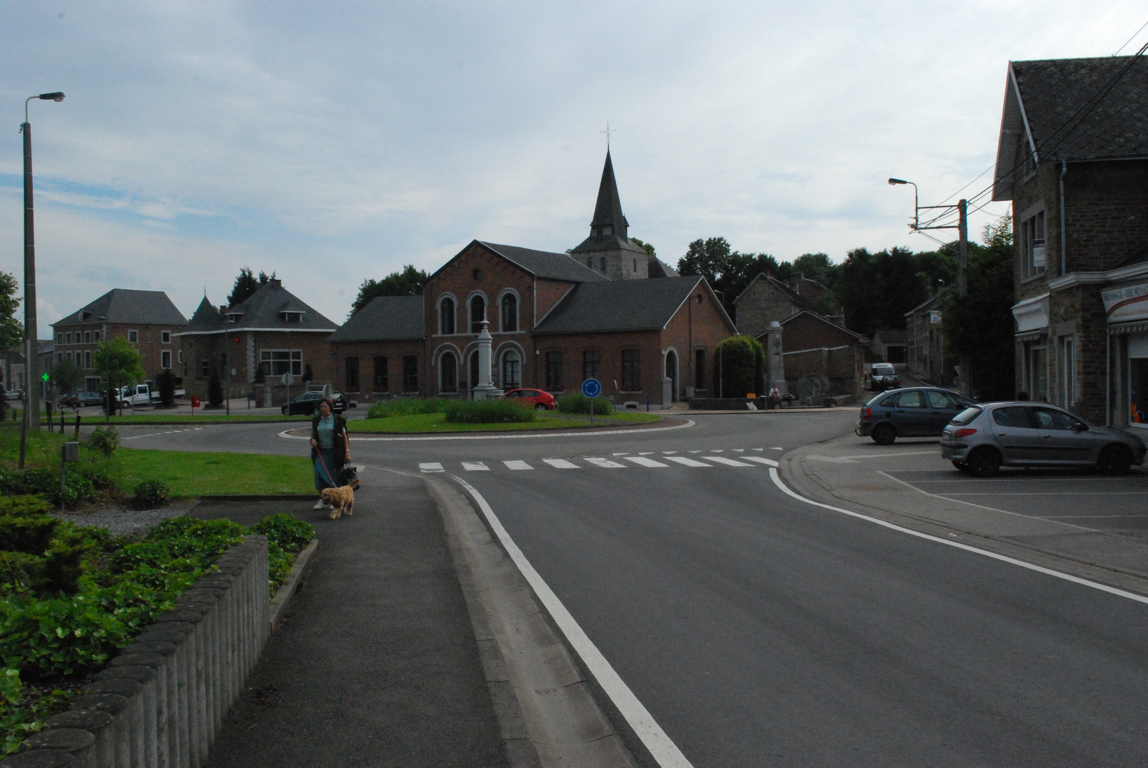 Vue de Nandrin.